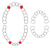 Hoektanden in rood aangegeven.